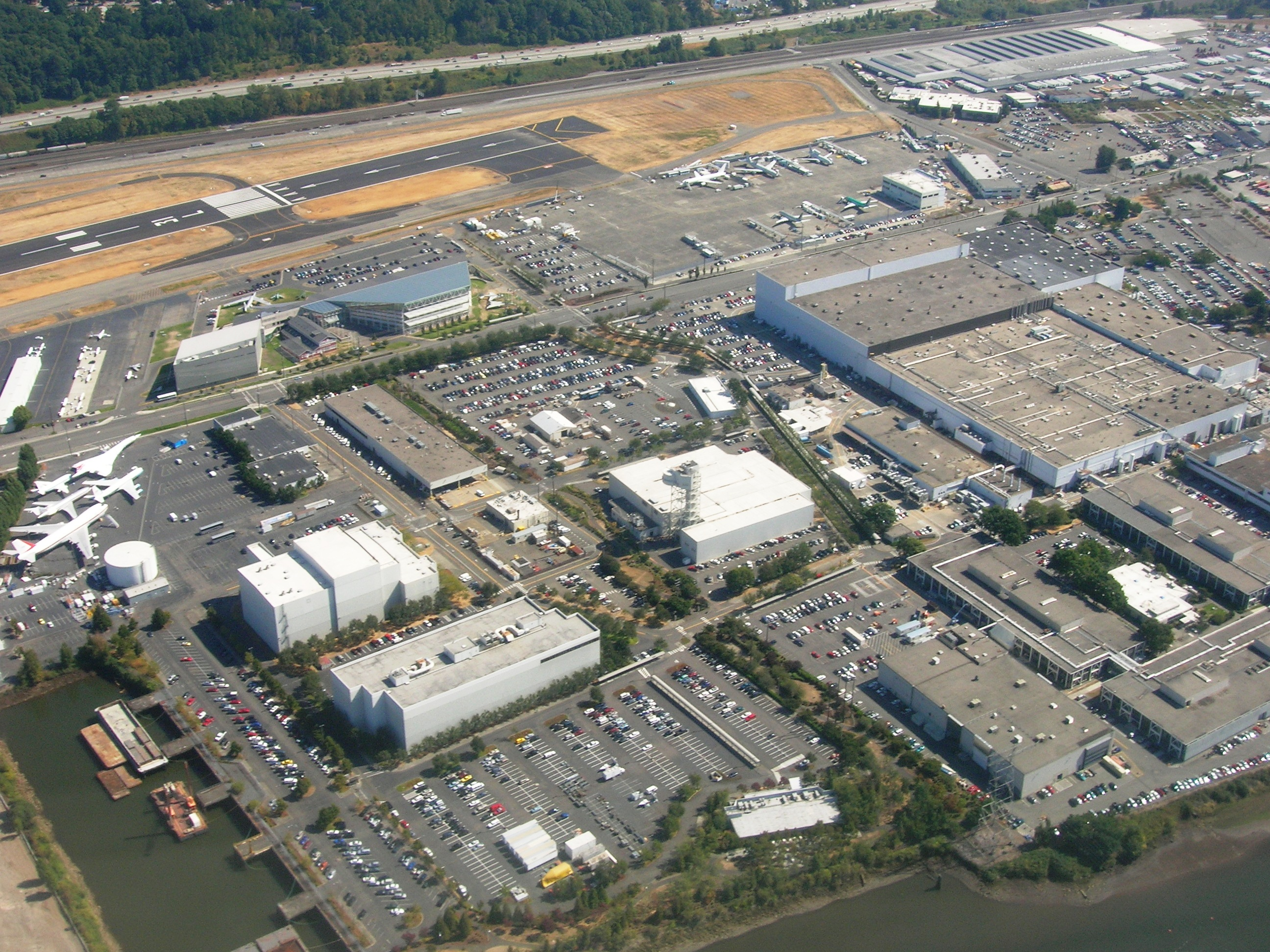 i090806 127